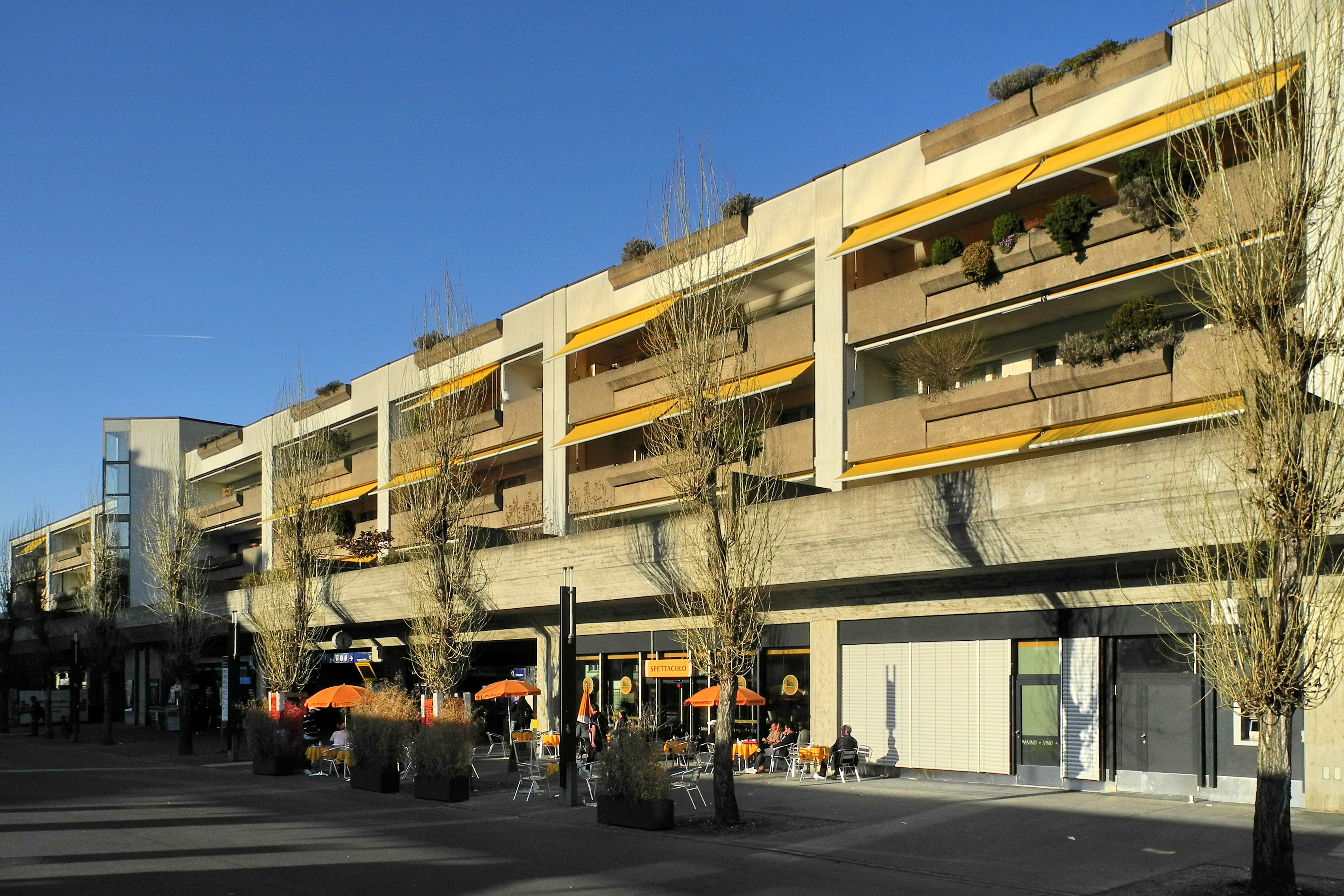 Bahnhof in Dietikon (Switzerland)